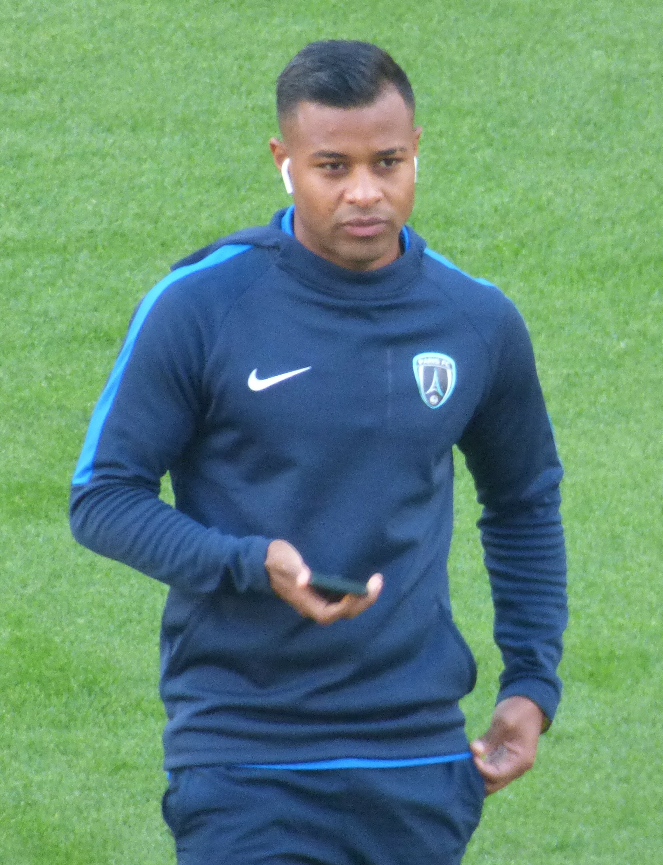 Dylan Azevedo avant le match Lens / Paris, comptant pour la neuvième journée du championnat de France de football de Ligue 2, le 28 septembre 2018.